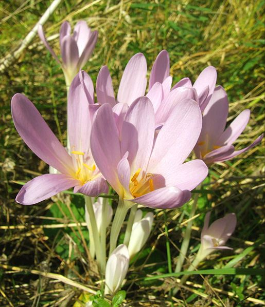 Őszi kikerics (Colchicum autumnale)